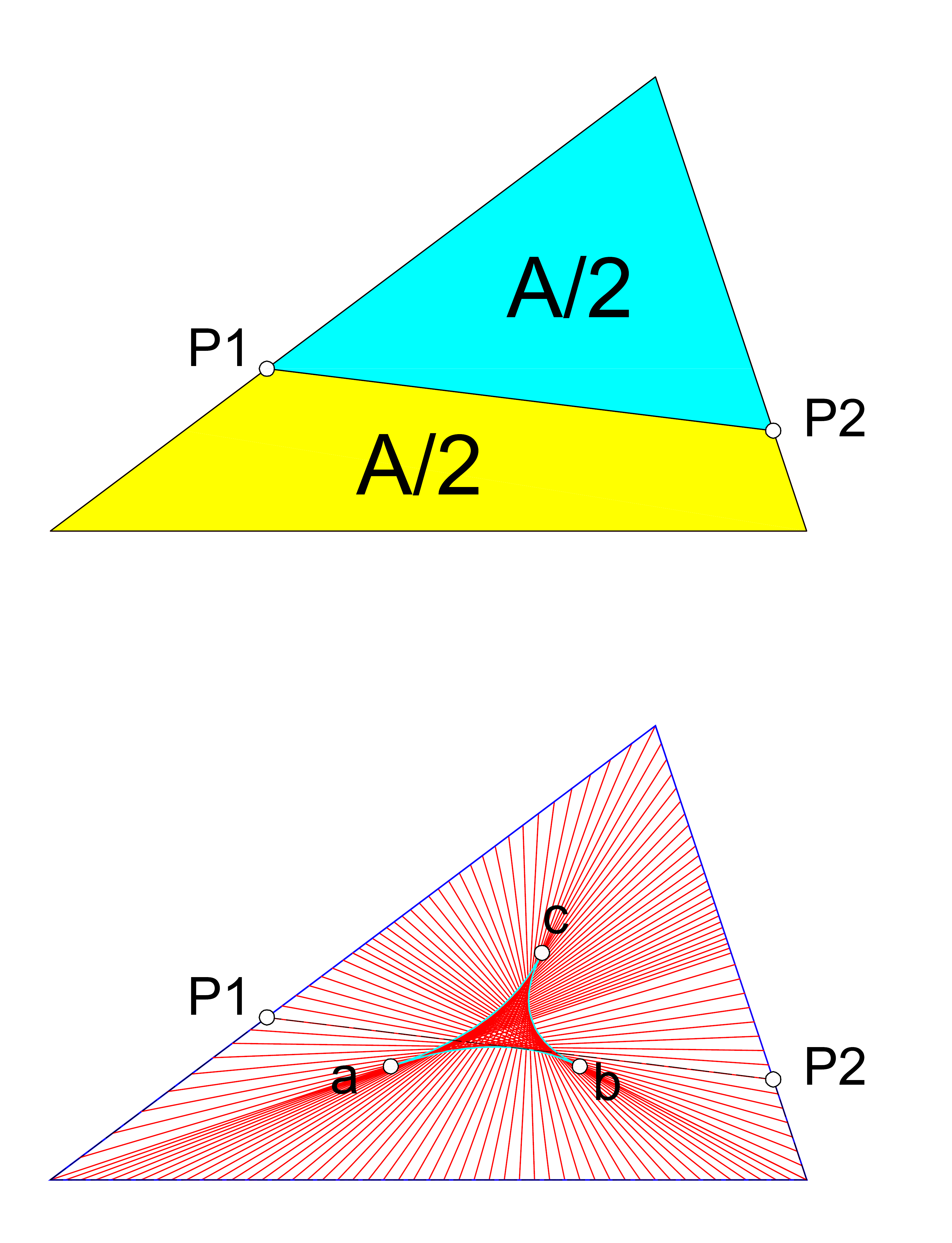 Conjunto de segmentos de recta que bisecan un triángulo, dividiéndolo en dos zonas de igual área. La envolvente interna de estas líneas forma un deltoide (a b c).